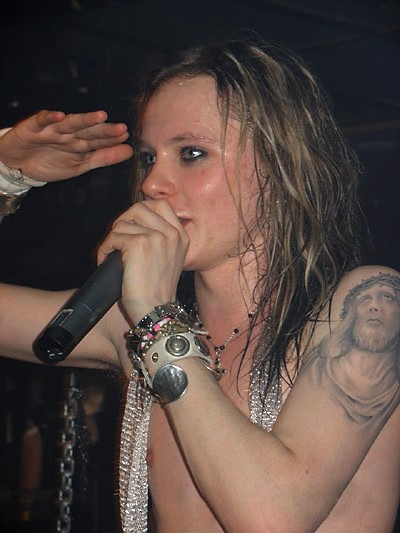 Jonne Aaron in Finnland; Konzertfoto negative